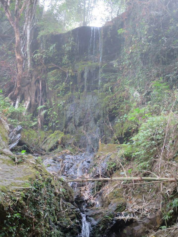 Remexio Vila